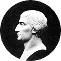 Cameo raffigurante Carlo Imbonati (1753-1805)